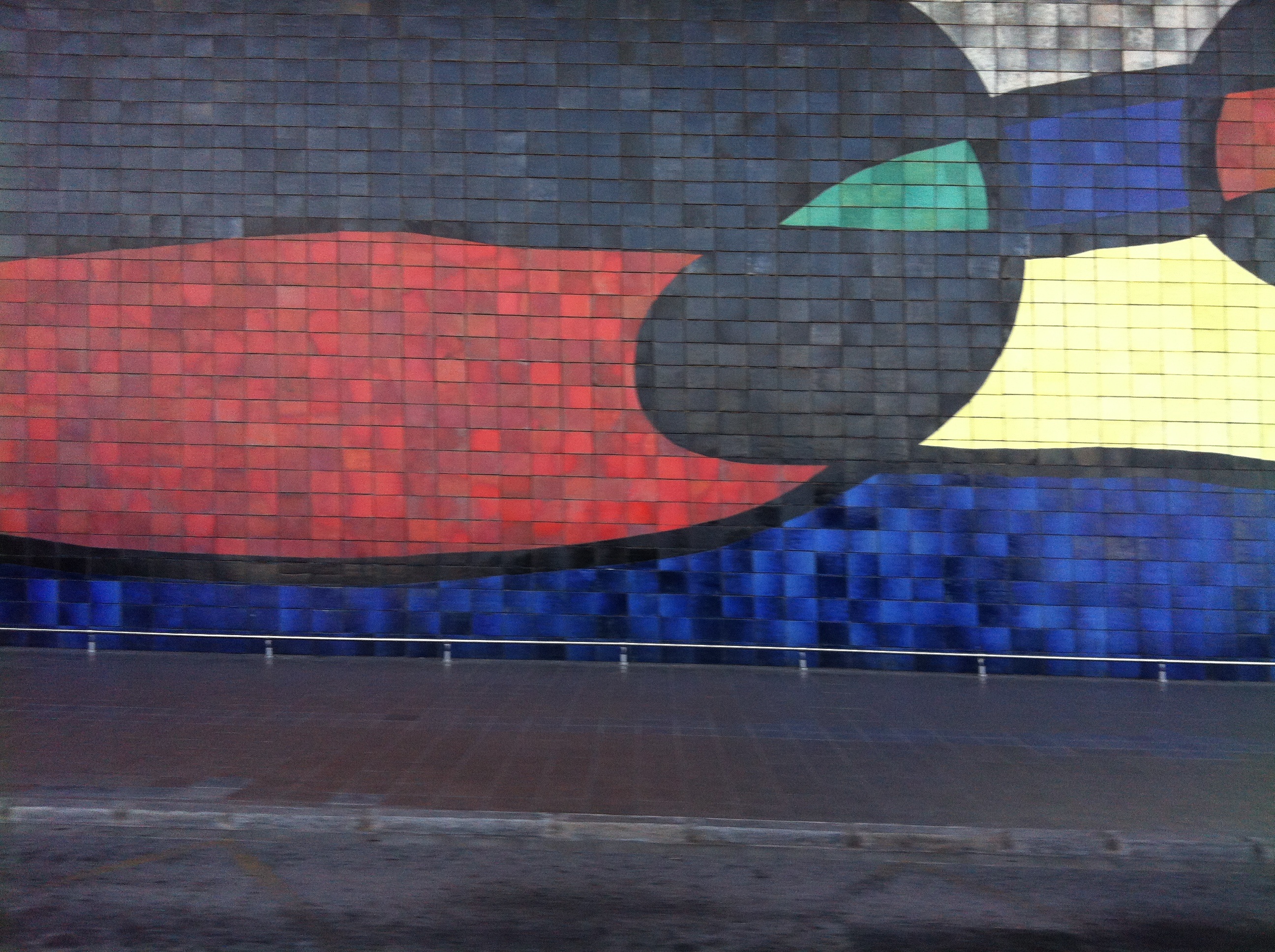 Mural Joan Miró Aeroport de Barcelona abril 2014